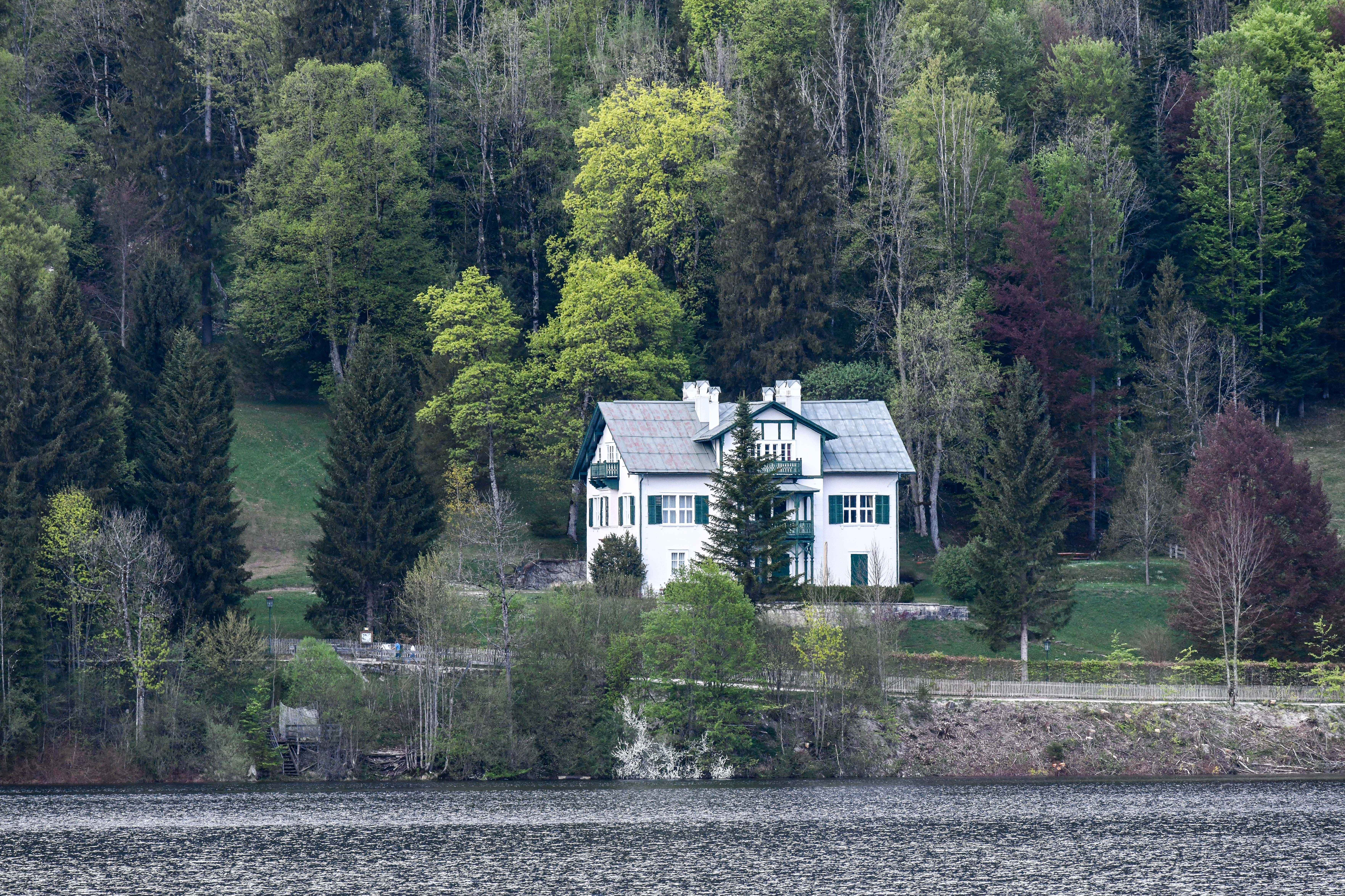 Villa Wassermann am Ufer des Altausseersees